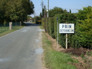 promenade